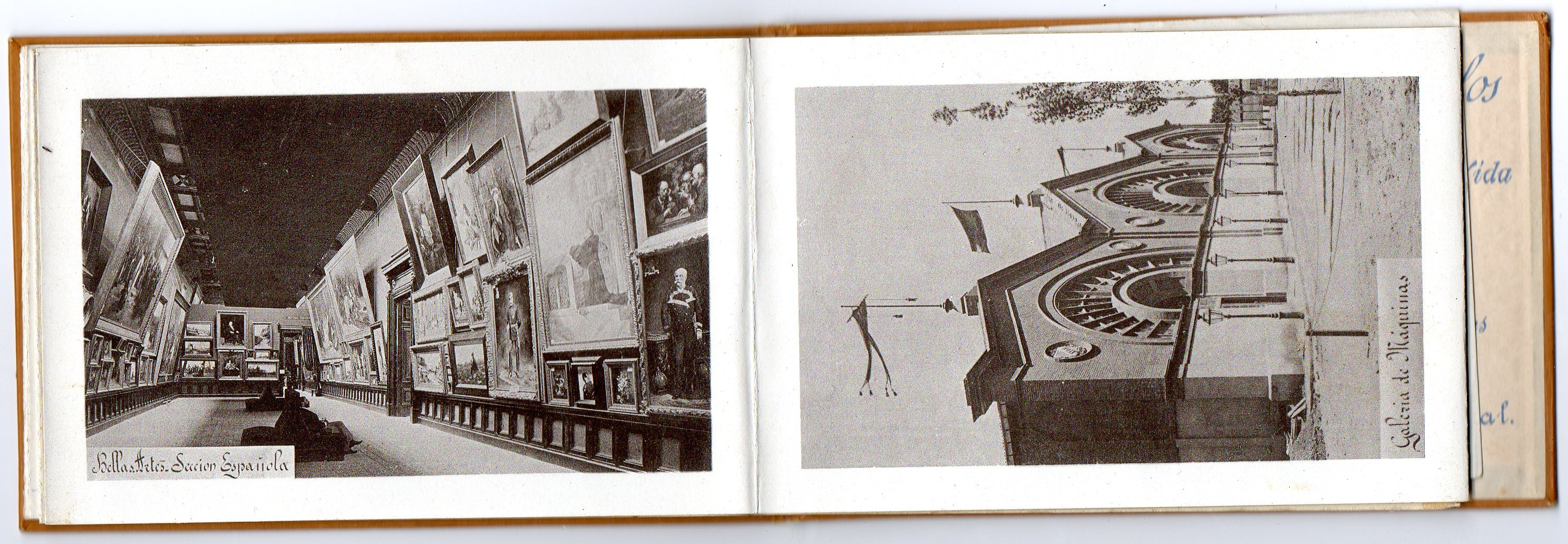 Fotografías S. XIX